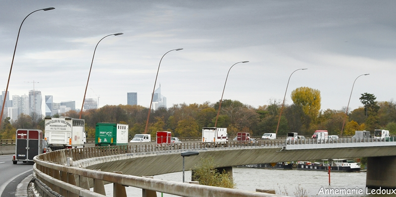 Photographie prise lors de la manifestation anti Equitaxe du 19/11/2013 à Paris